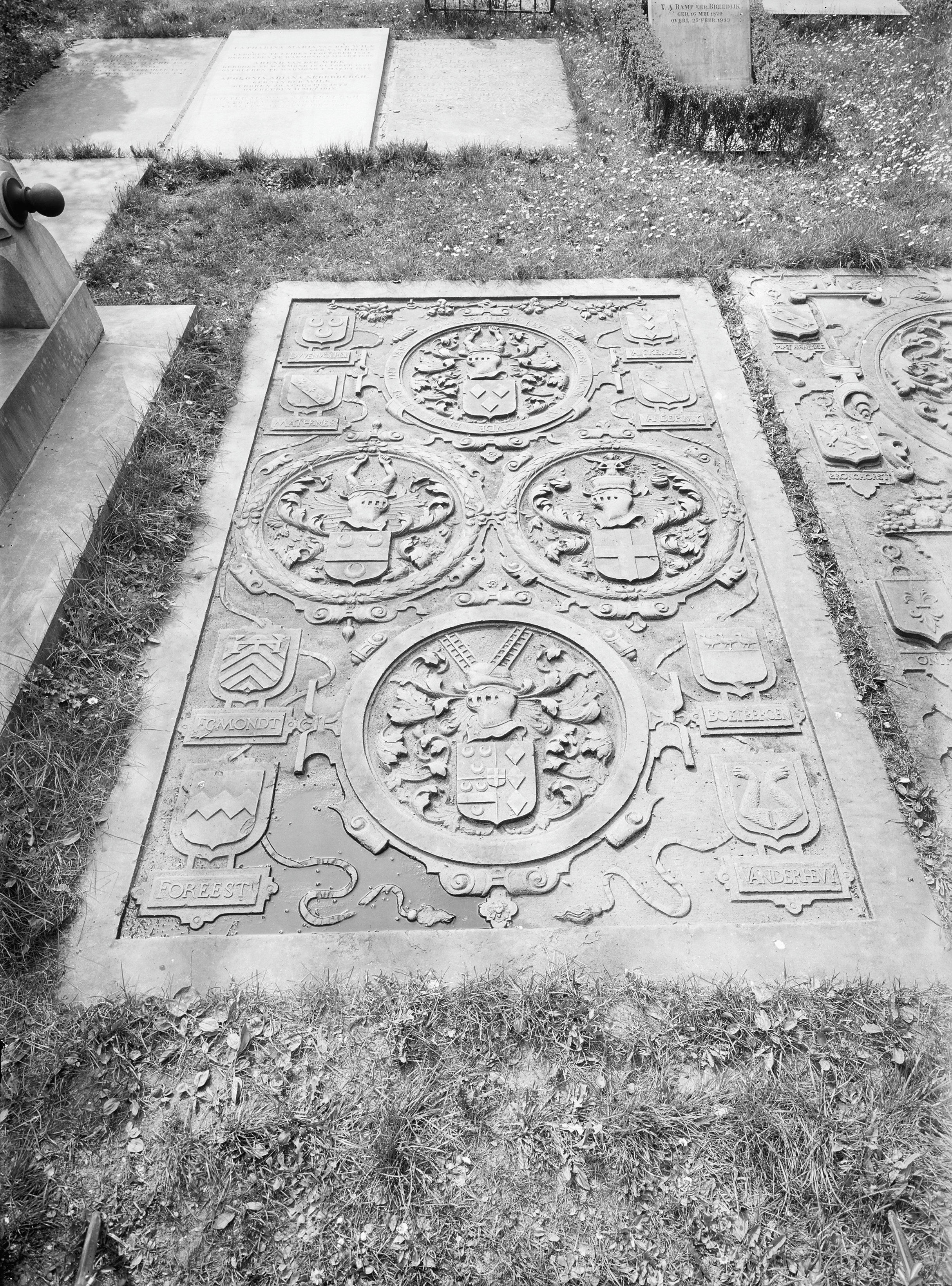 Nederlands Hervormde Kerk en Toren: bouwval oude kerk, grafzerk van Jacob van Woude